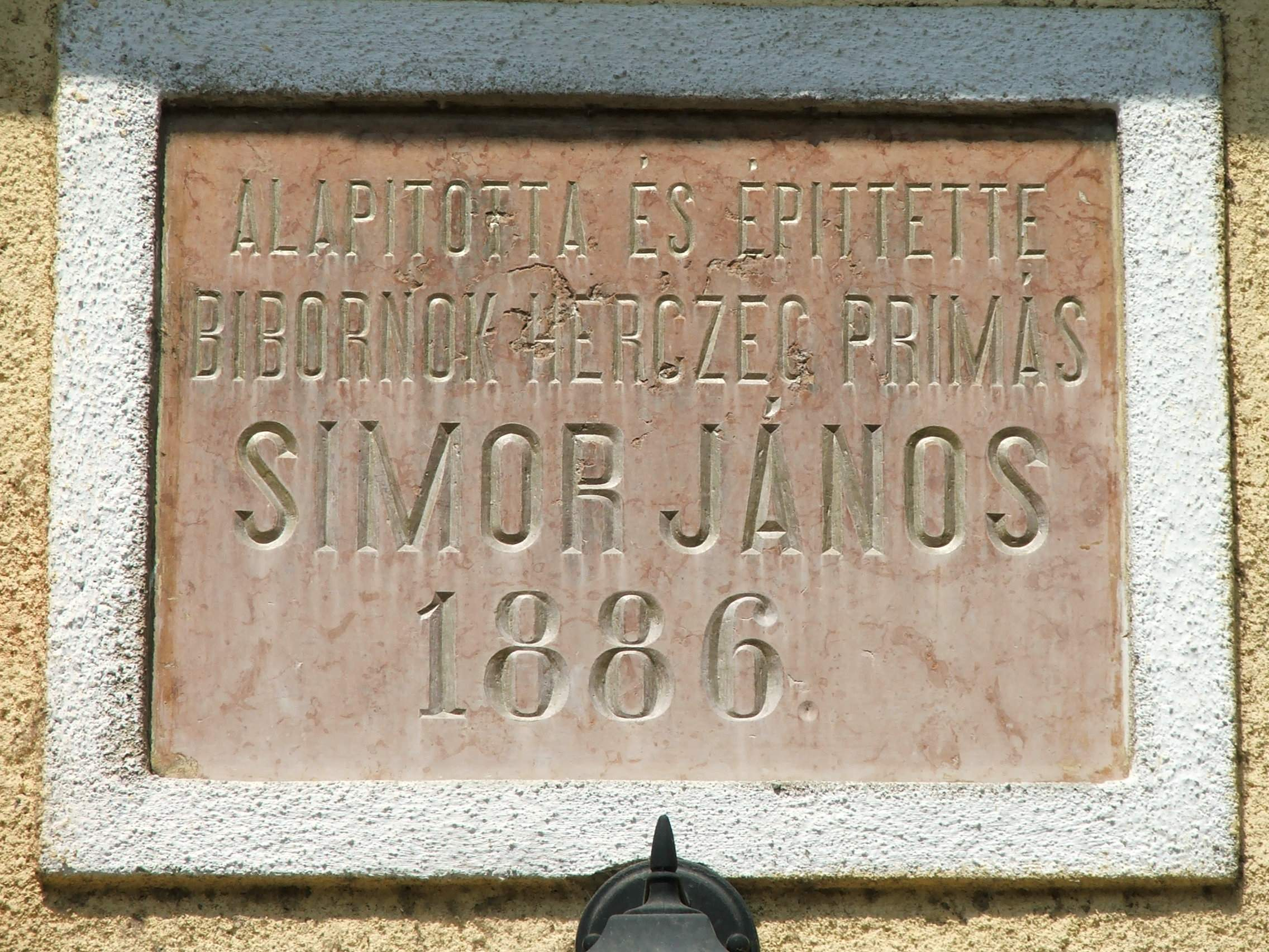 Simor János emléktábla, Szent Rita Otthon